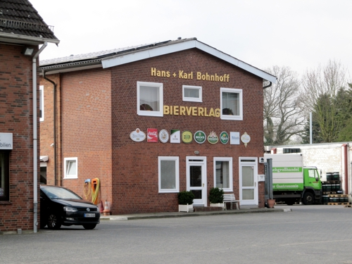 Gebäude des Bierverlags Bohnhoff in Hamburg